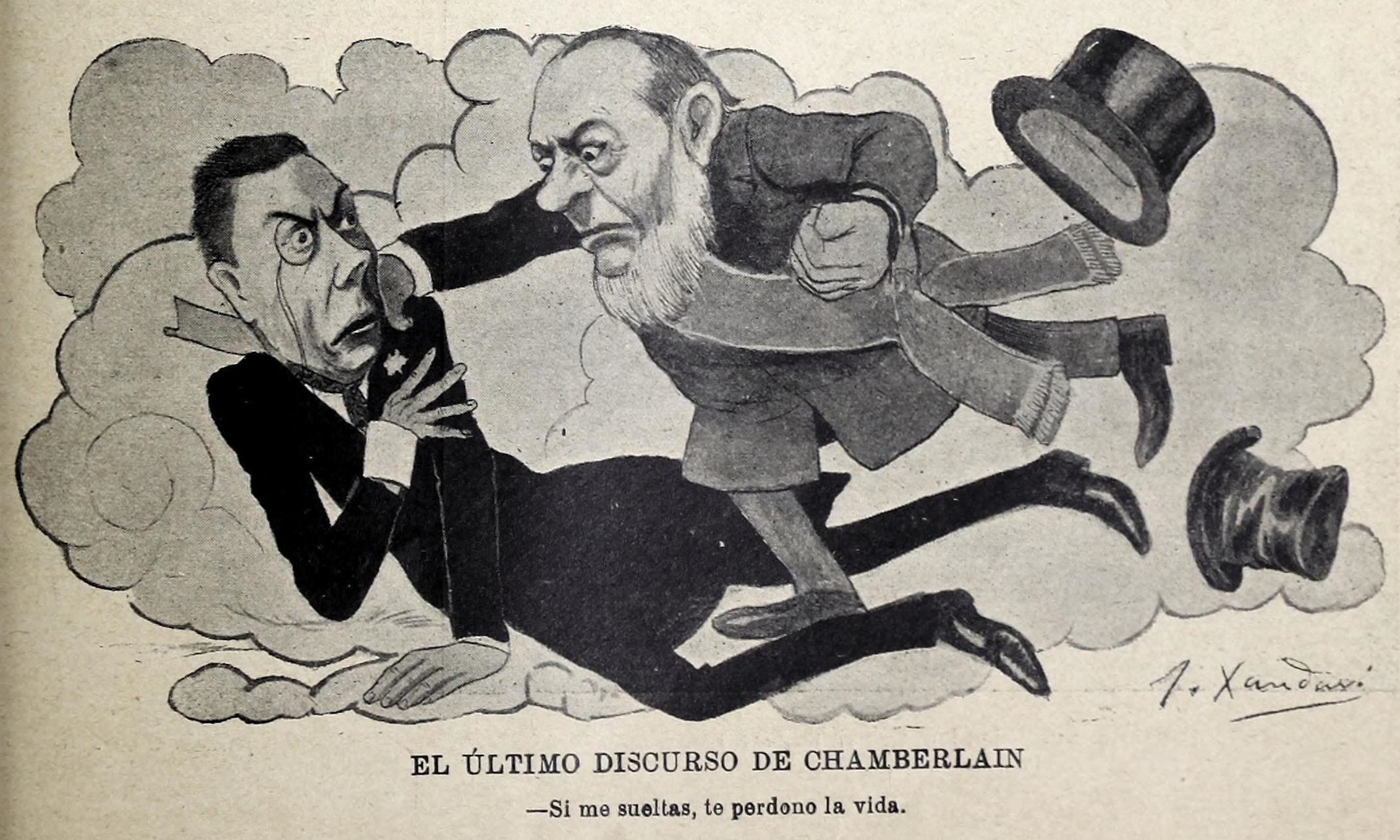 El último discurso de Chamberlain. Si me sueltas te perdono la vida.